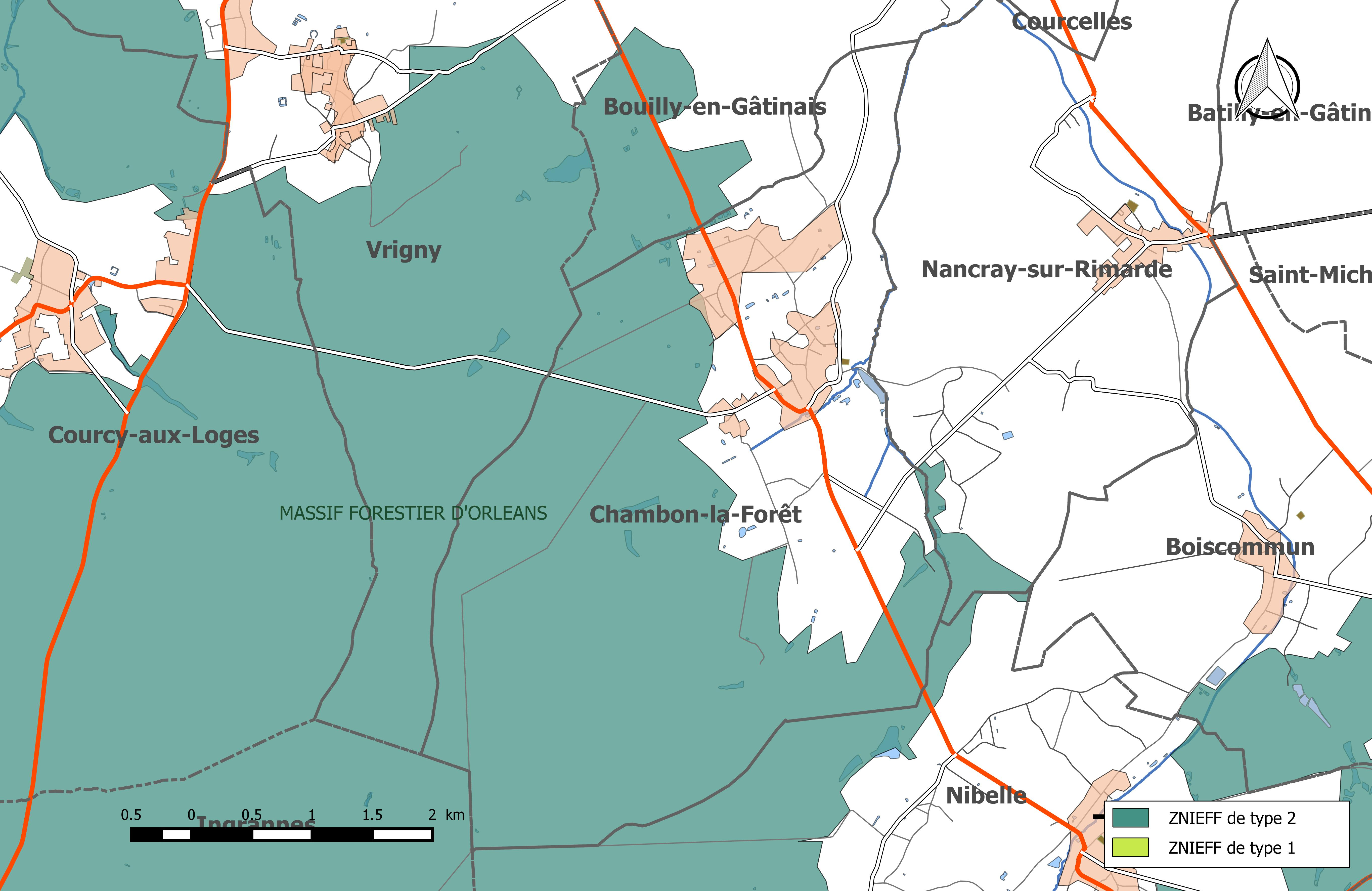 Carte des Zones naturelles d'intérêt écologique faunistique et Floristique (ZNIEFF) de la commune de Chambon-la-Forêt.